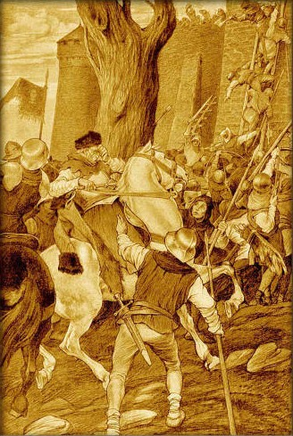 Věnceslav Černý - Žižka raněn do oka před Rábím